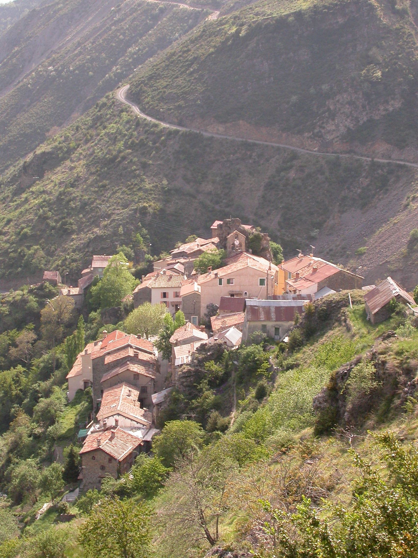 village de Pierlas